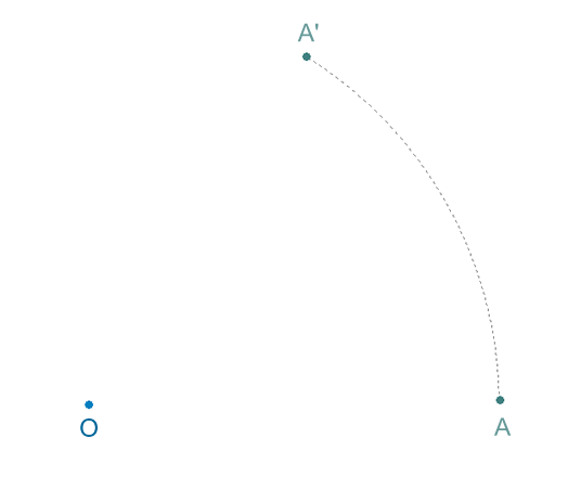 Rotación , transformaciones isométricas, Geometry